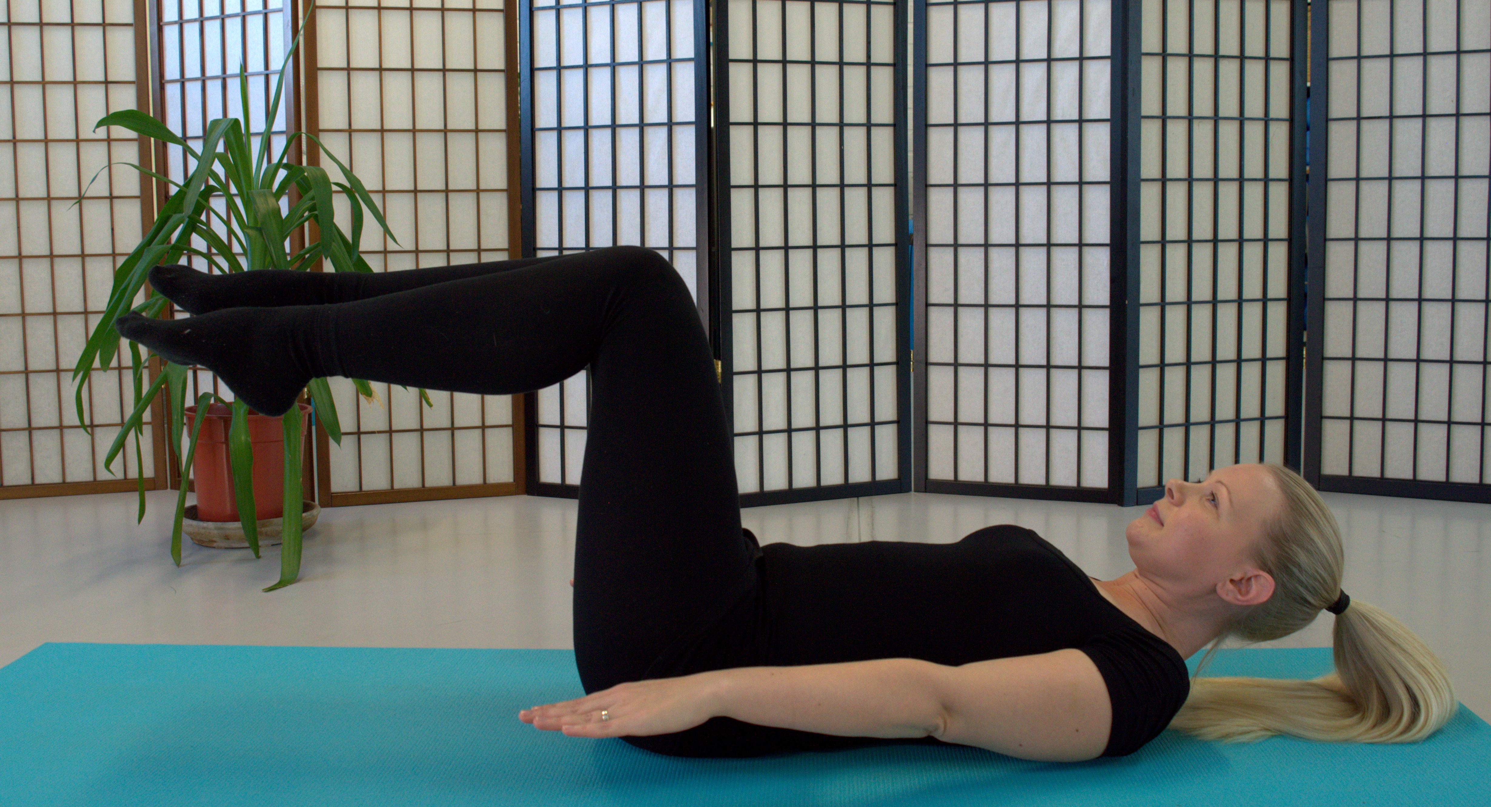 Klassinen pilatesliike satanen